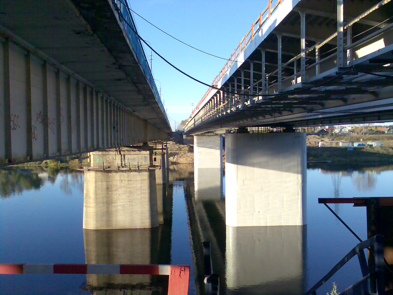 Мигаловский мост снизу